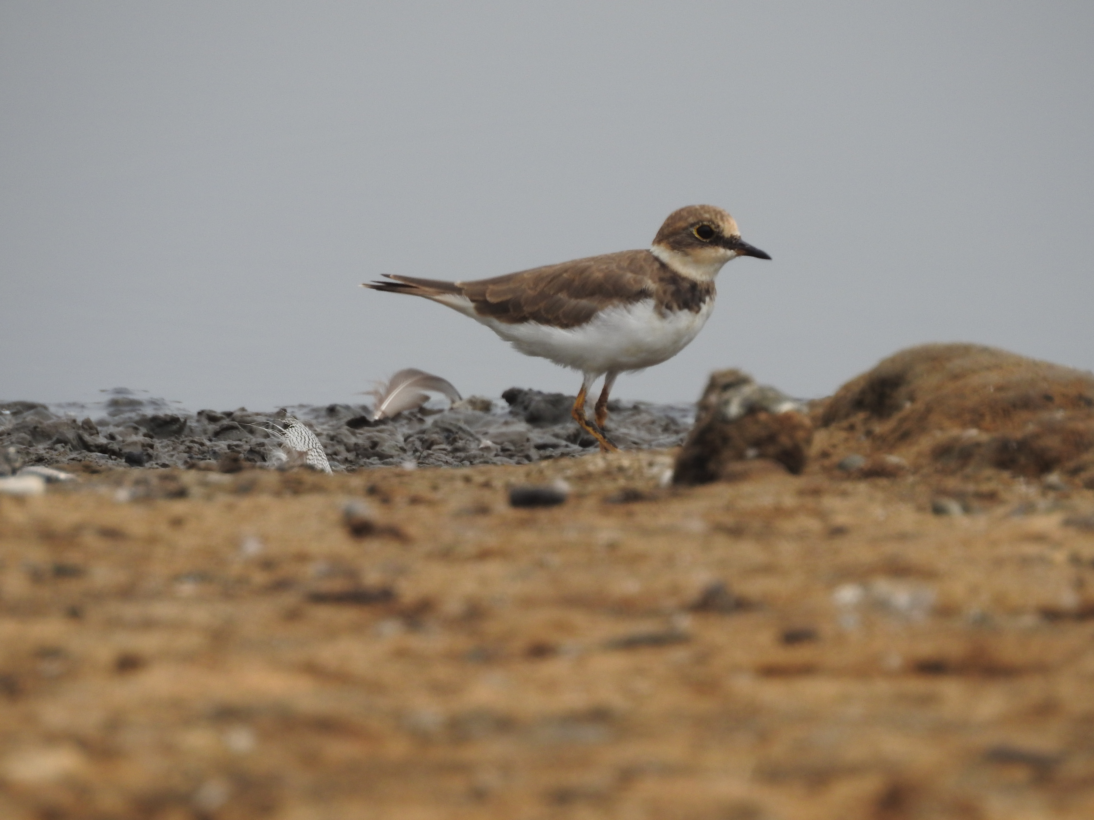 ആറ്റുമണൽക്കോഴി